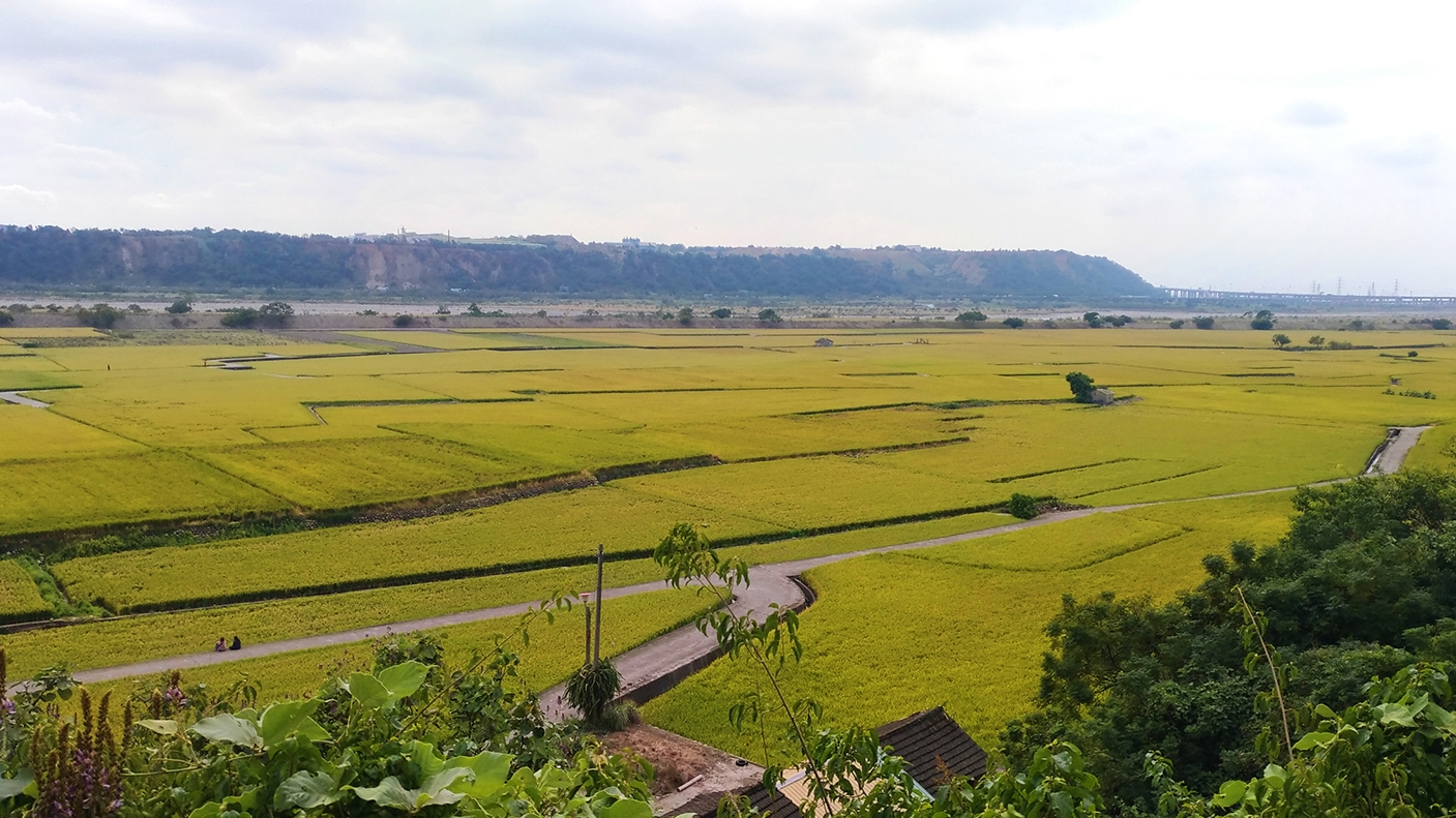 中文（台灣）: 位於臺中市外埔區大甲溪畔的稻田區